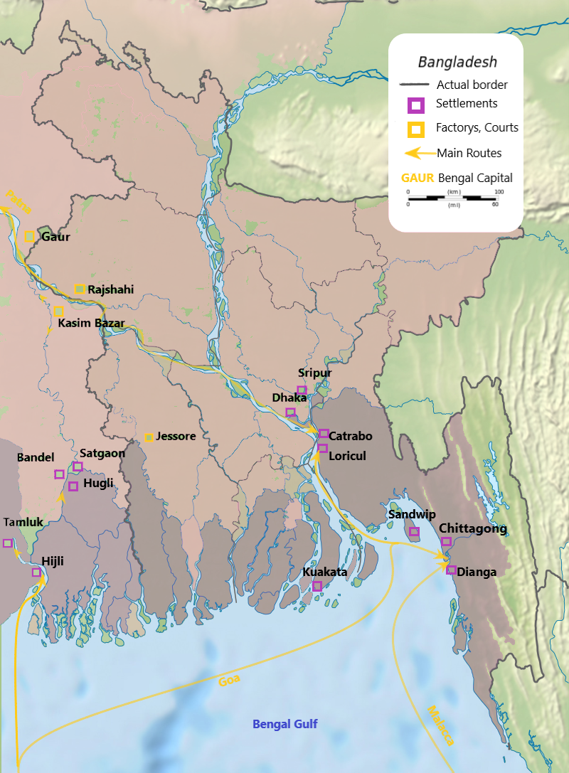 Colonização portuguesa no Bangladesh e na Baía de Bengala do século XVI ao XIX.